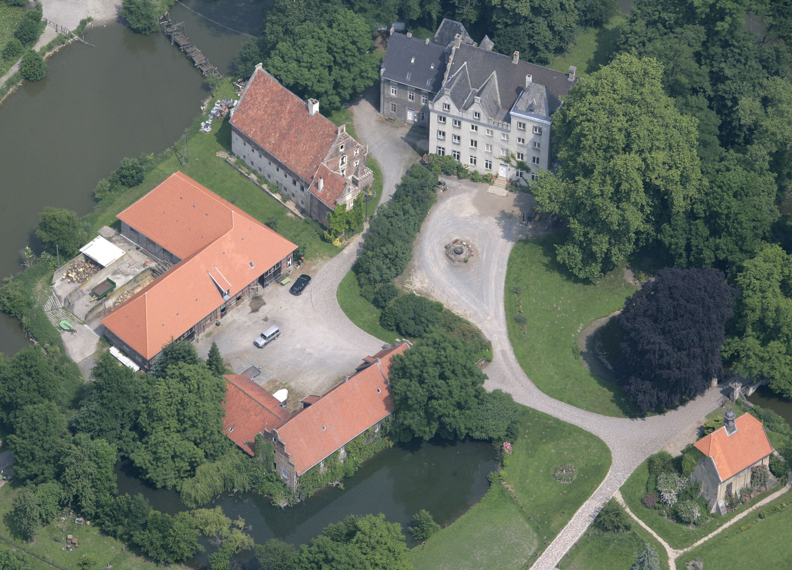 Luftbildaufnahme Hamm